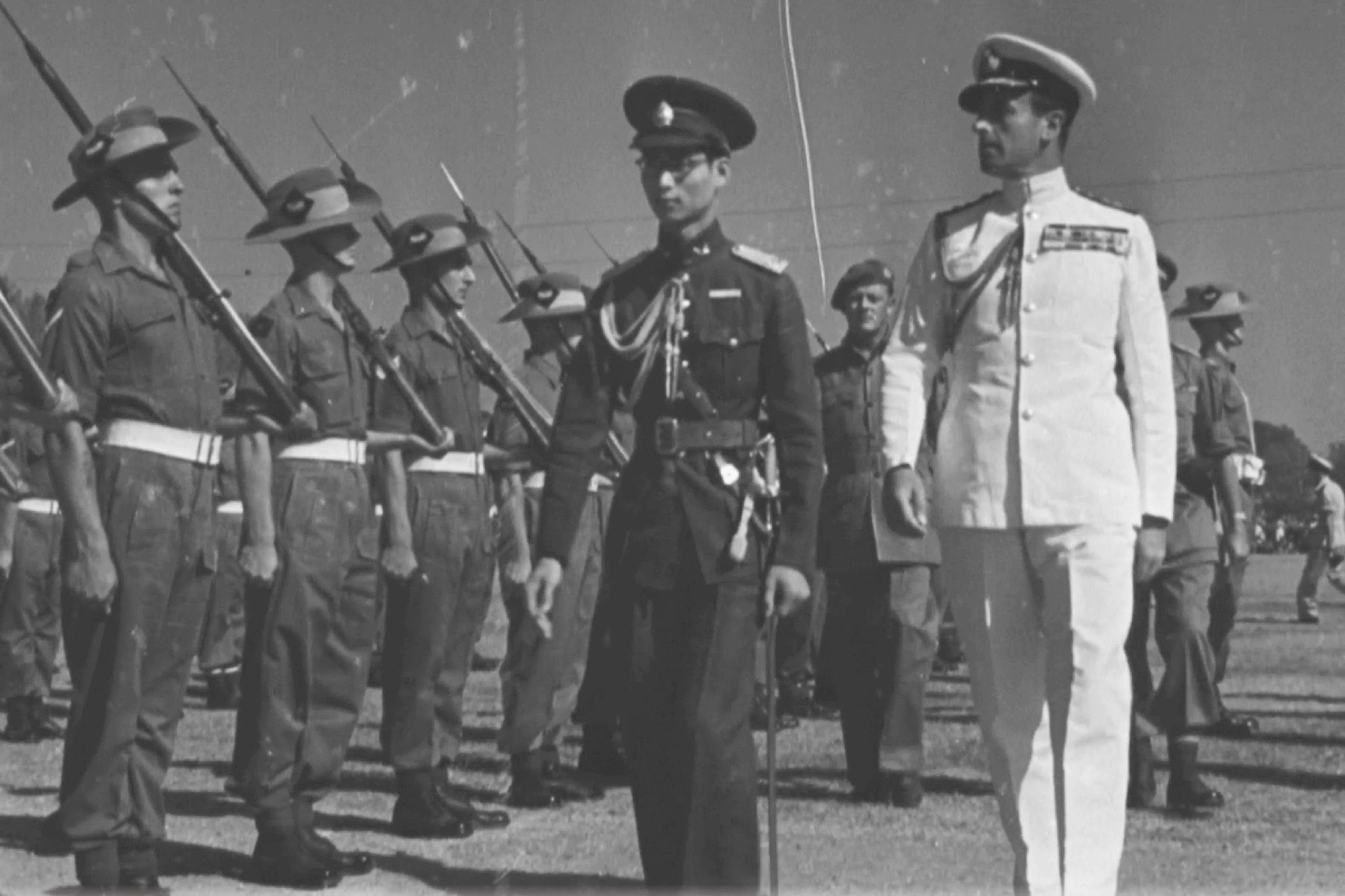 รัชกาลที่ 8 (อานันทมหิดล) ในปี ค.ศ. 1938